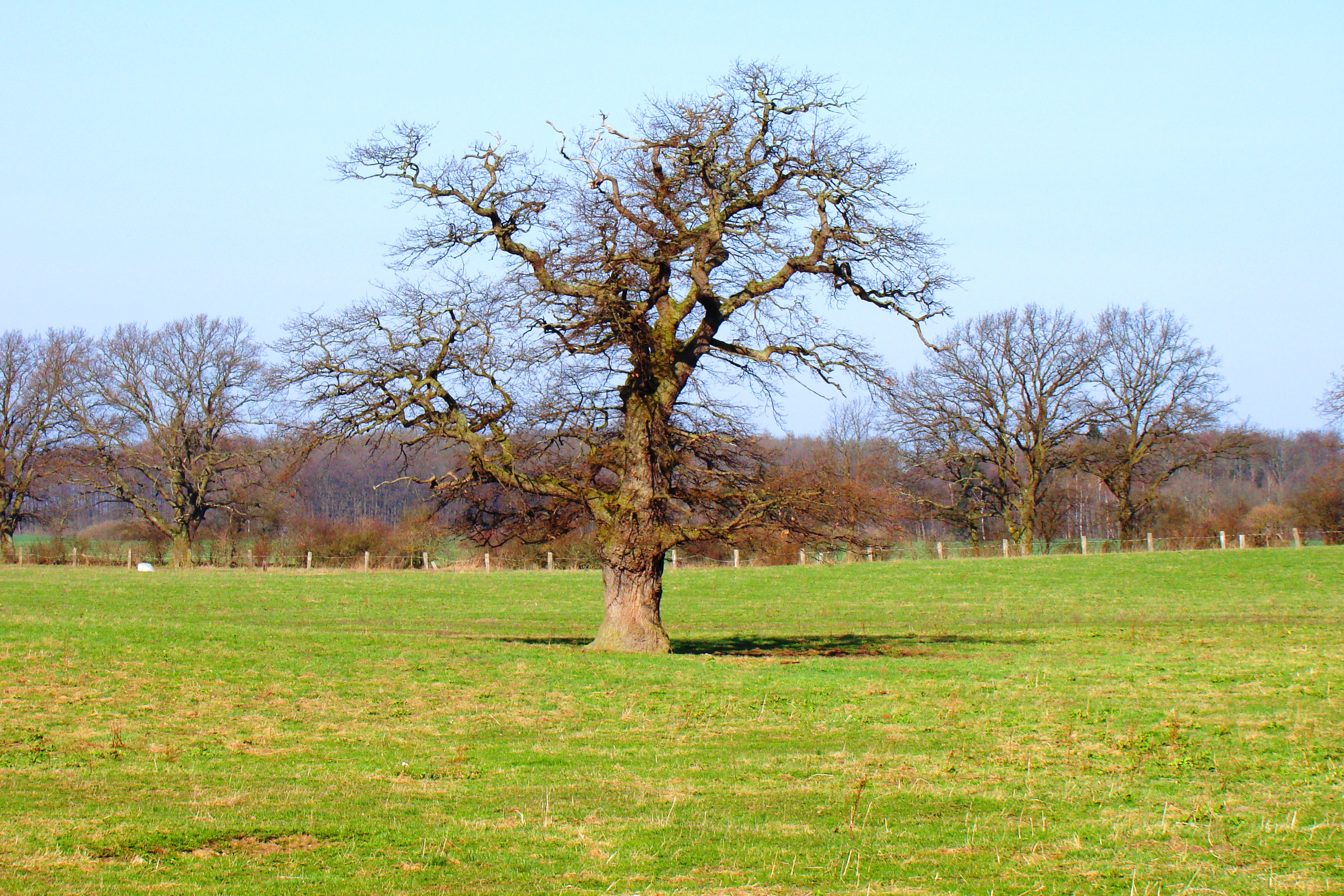 Landschaft mit Eiche hinter dem Pfarrhaus von Breesen, die Caspar David Friedrich 1822 zu seinem Bild "Dorflandschaft mit Morgenbeleuchtung" inspiriert haben soll